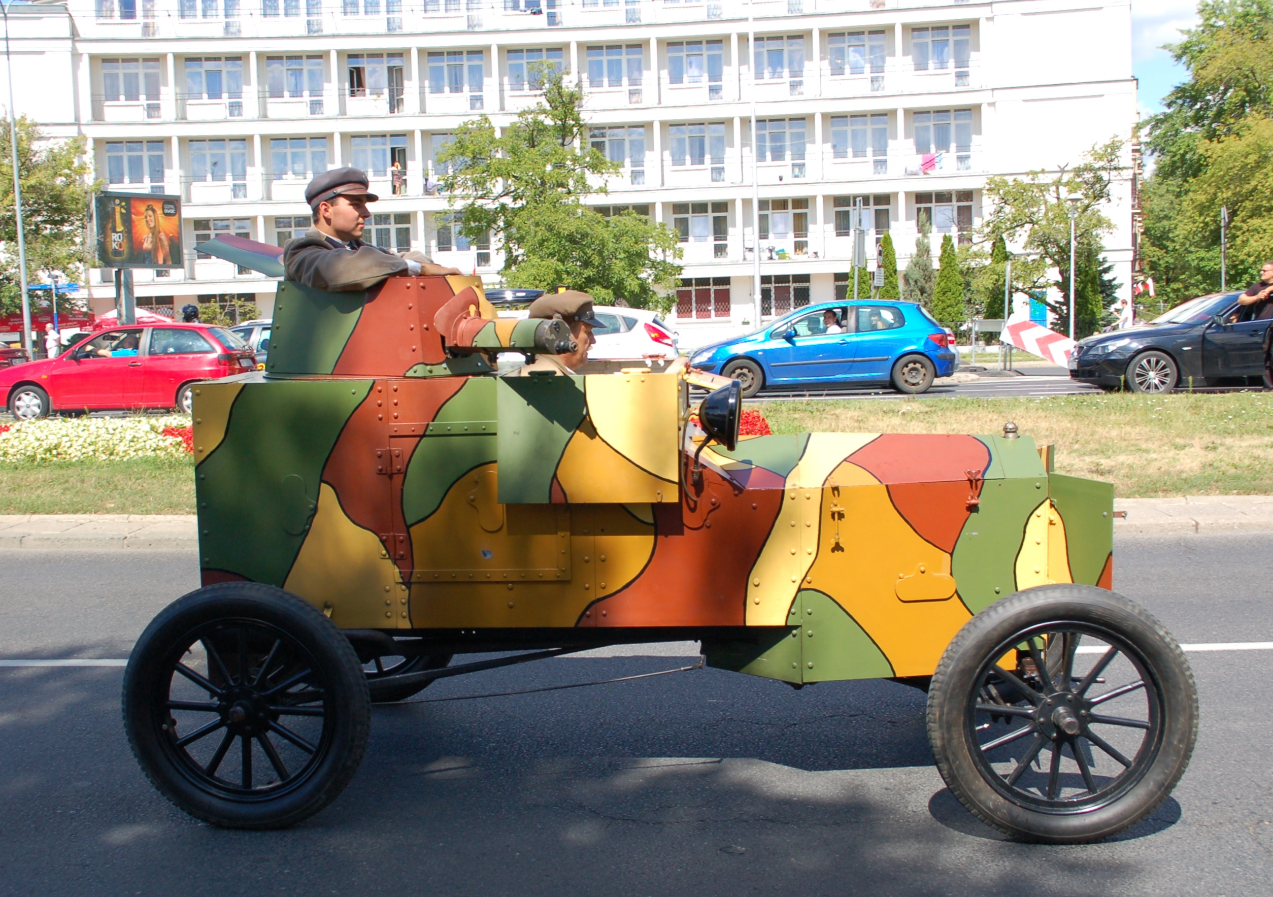 2013, Święto Wojska Polskiego